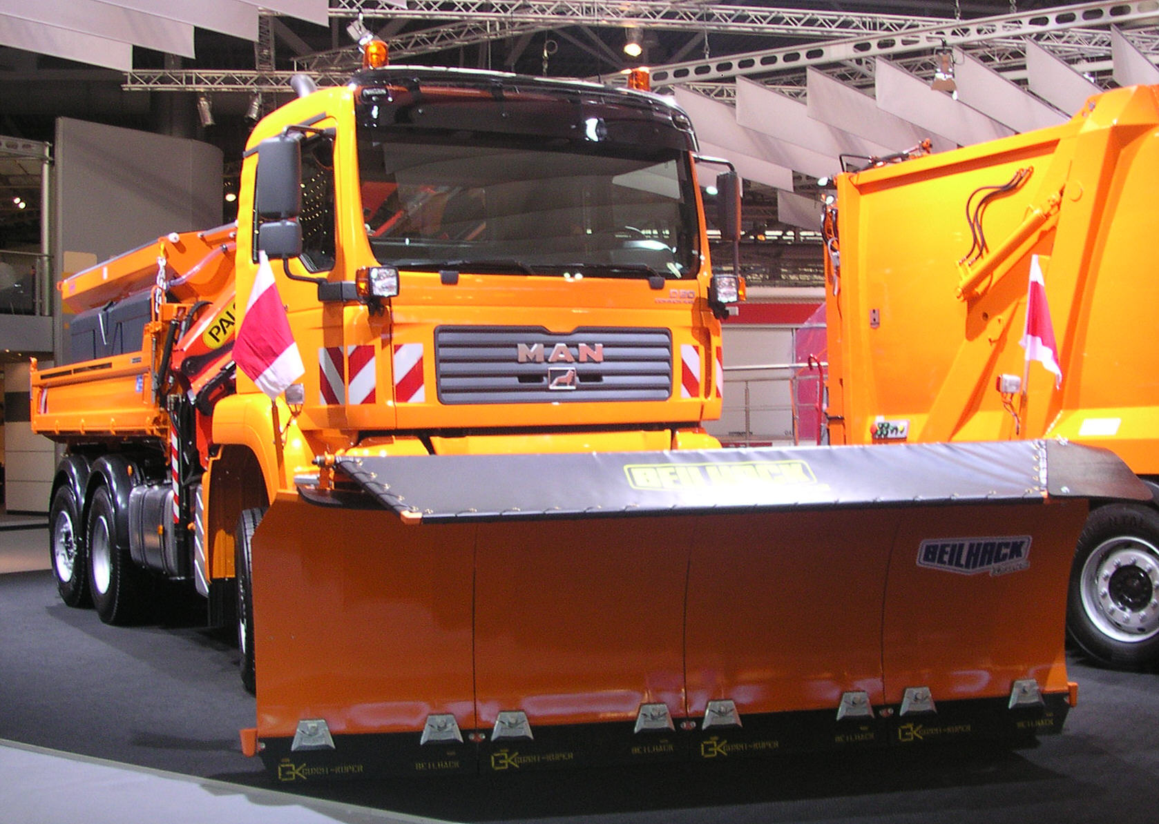 Nutzfahrzeug-IAA 2004 in Hannover. MAN D 20 Kipper mit Schneepflug, hintere Achse offenbar gelenkt (Nachlaufachse?)